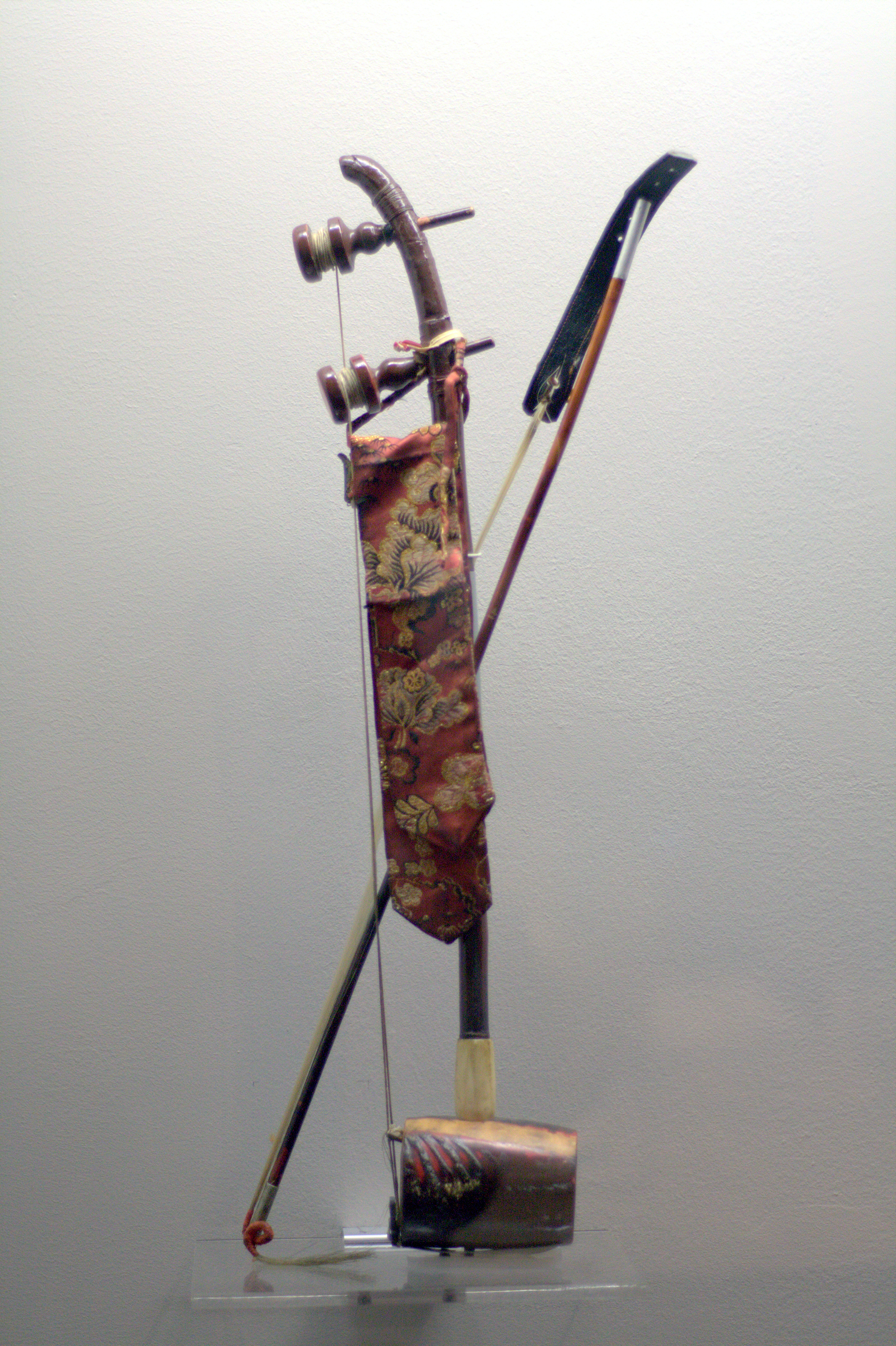 국립중앙박물관 '120년 만의 귀환, 미국으로 간 조선 악기' 특별 전시에 나온 해금